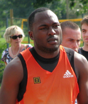 Alex Wilson beim DLV-Olympia-Testwettkampf 2012 im Sepp-Herberger-Stadion Weinheim.